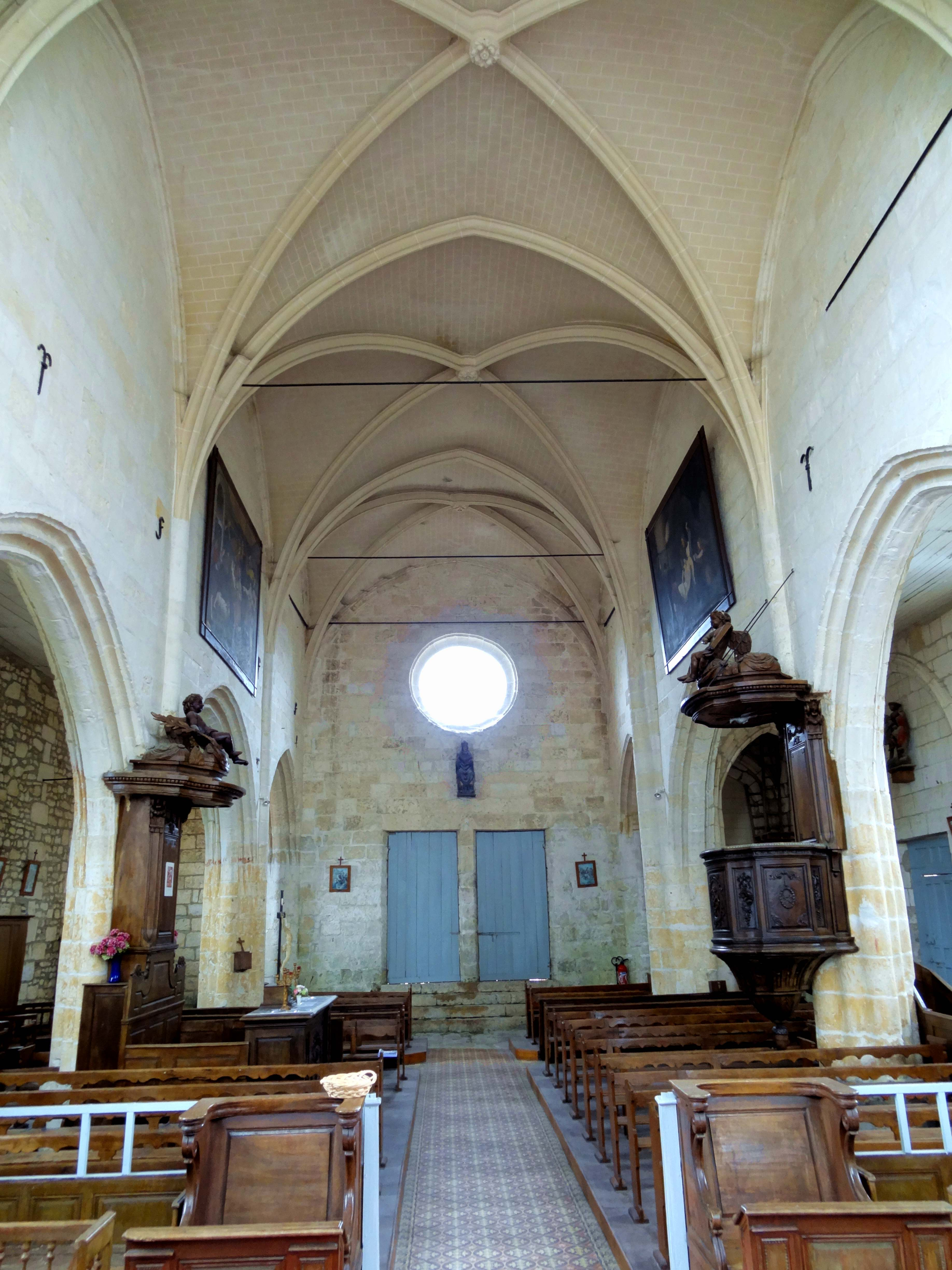 Intérieur de l'église - voir titre.